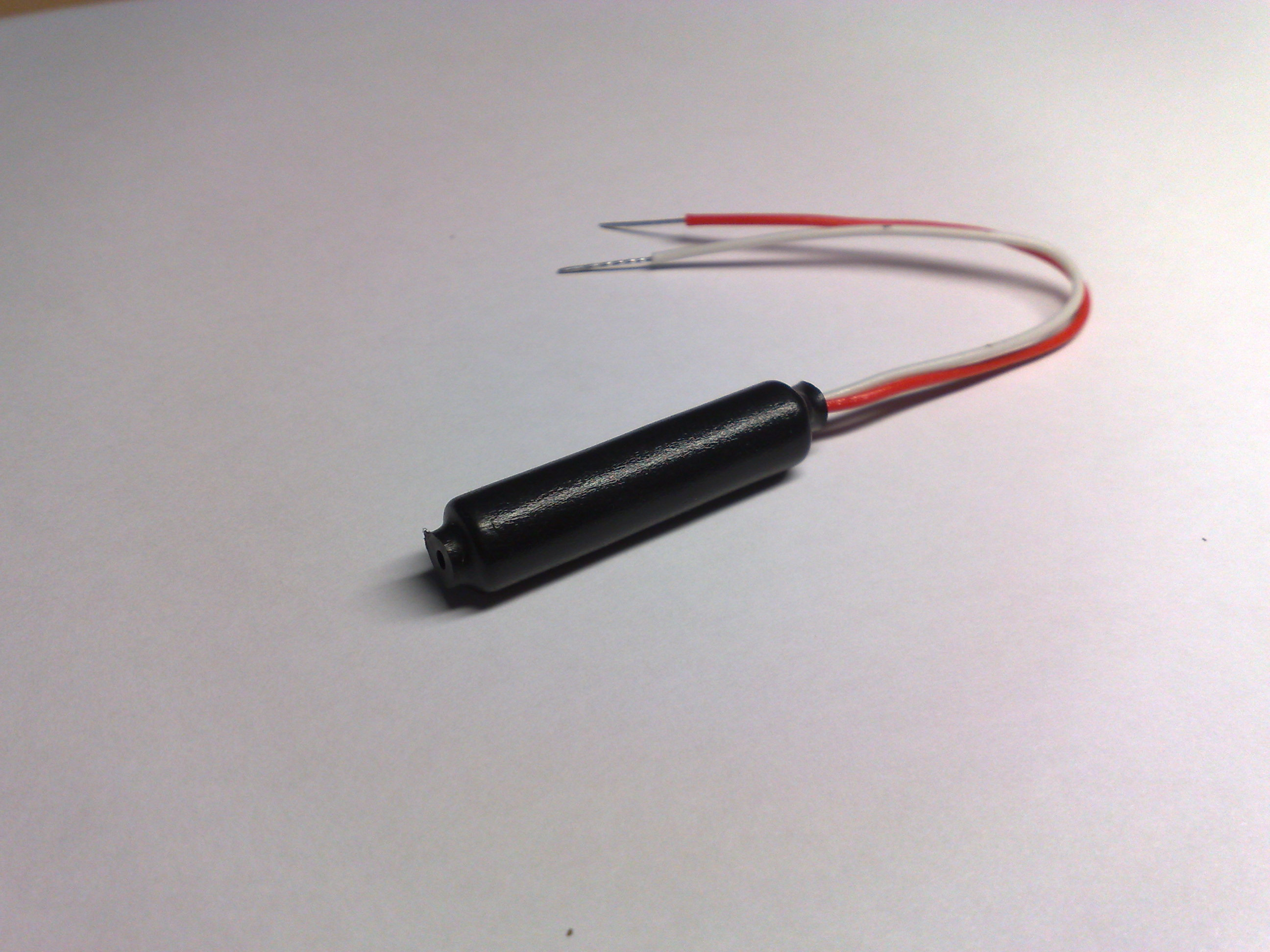 Микрофон для систем видеонаблюдения (аудиоконтроля)